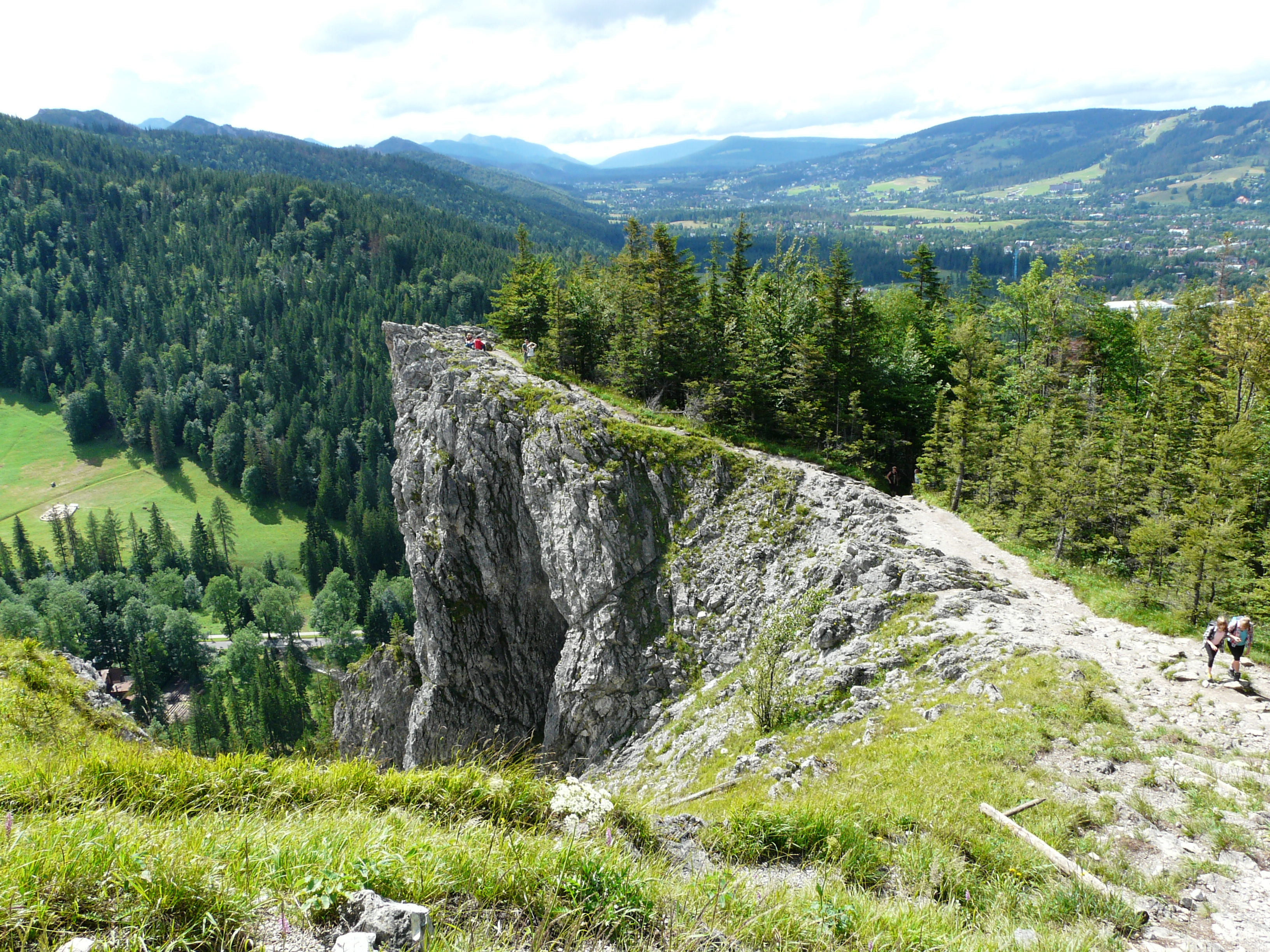 Droga na i widoki z Kużnic na Nosala, Tatry.